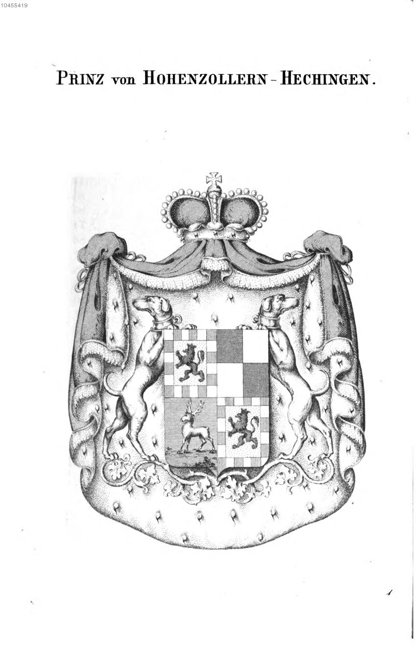 Wappen Hohenzollern Hechingen - Tyroff AT.jpg